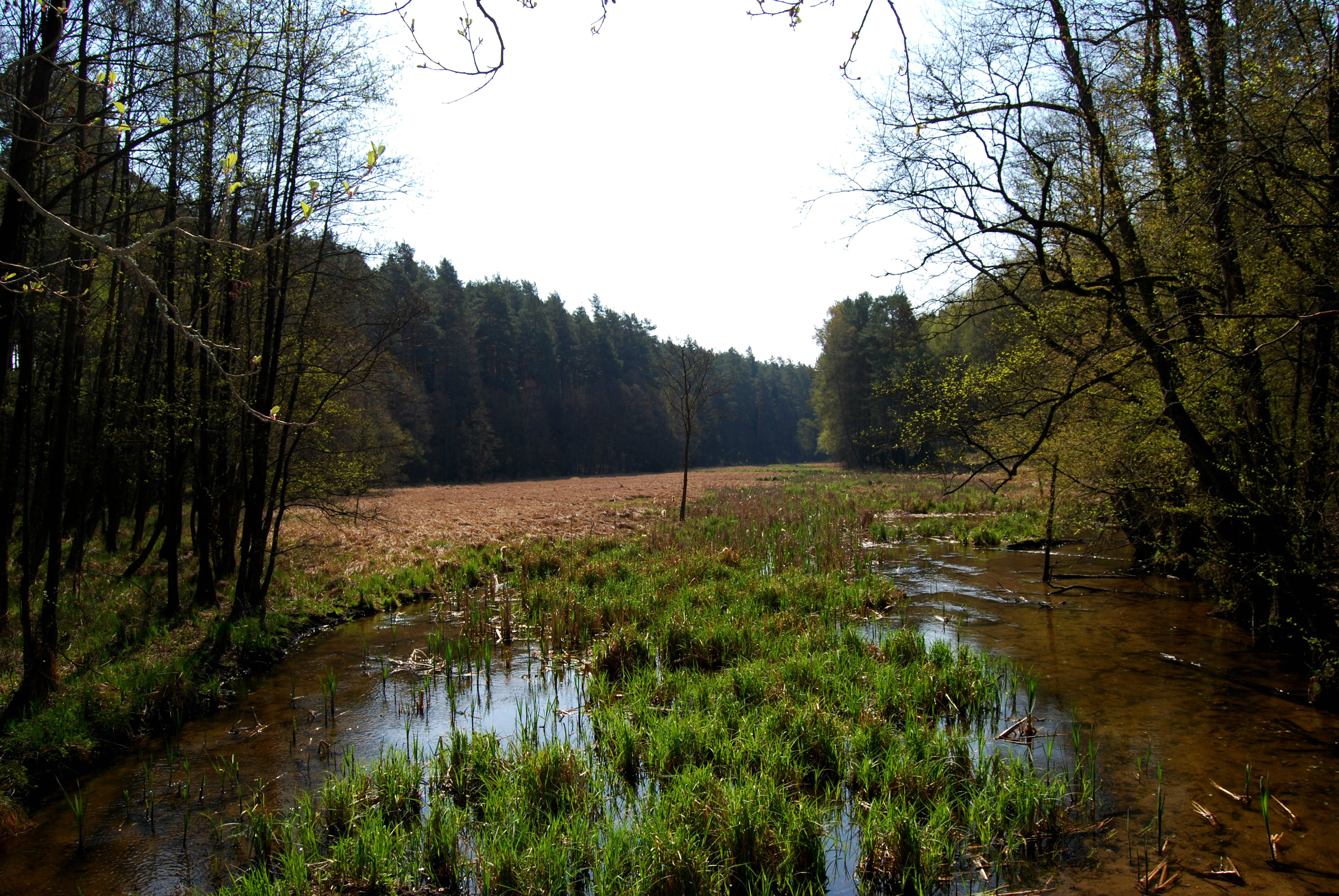 Rezerwat Bagna nad Stążką This is a photography of Natura 2000 protected area with ID PLH040023